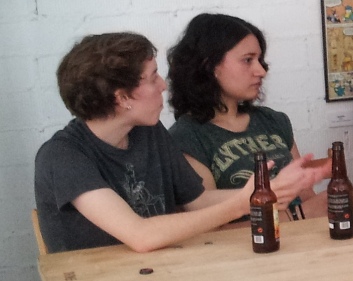 Nuria Tamarit i Xulia Vicente.